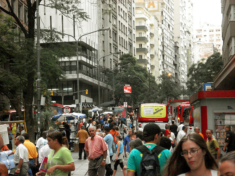 Cruzamento das avenidas Borges de Medeiros e Andradas, chamada comumente de "Esquina Democrática" por ser ponto freqüente de manifestações políticas, performances de artistas de rua e outros eventos, além de ser um dos locais de mais intenso tráfego pedestre da cidade